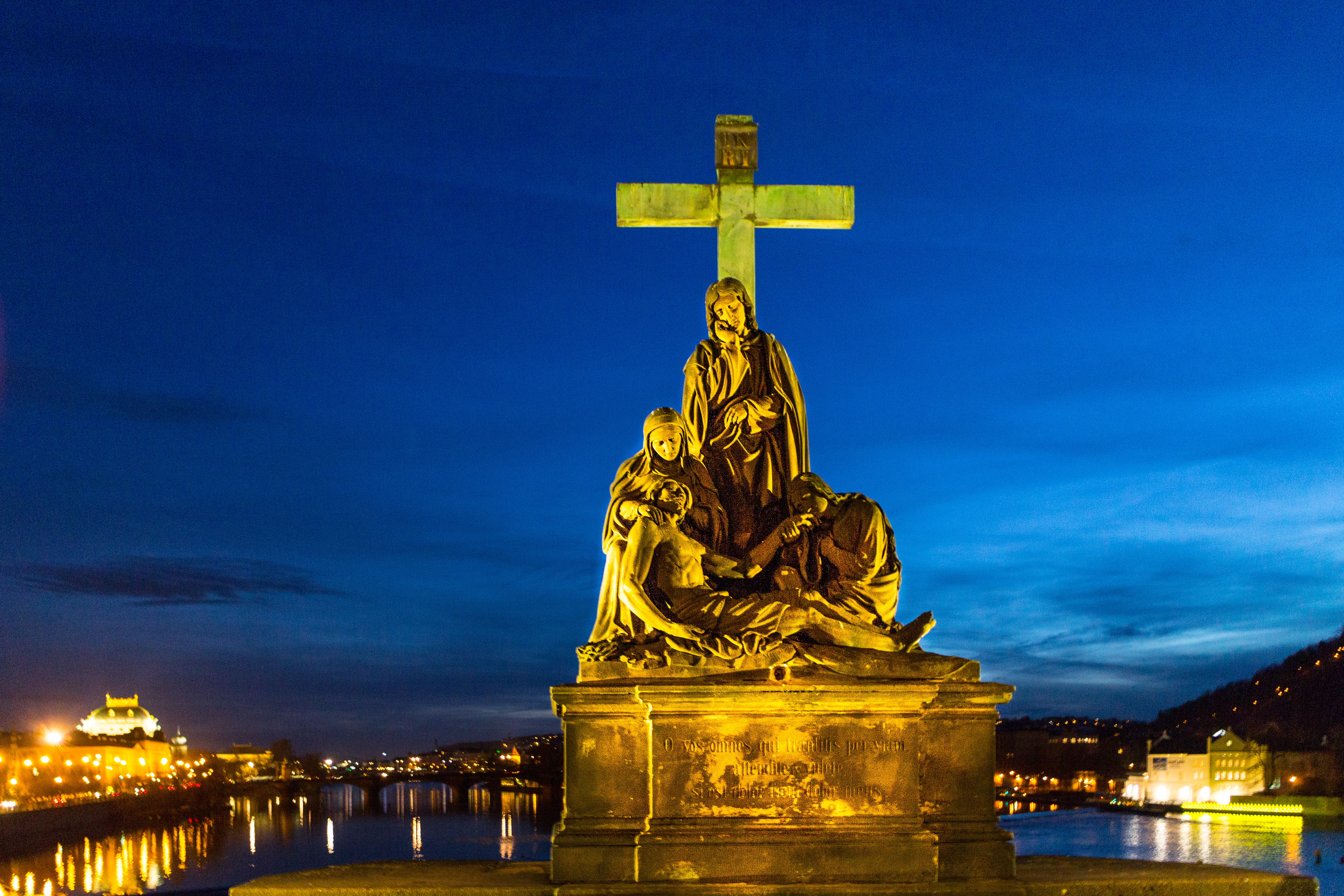 Pietà Statue auf der Karlsbrücke 2014